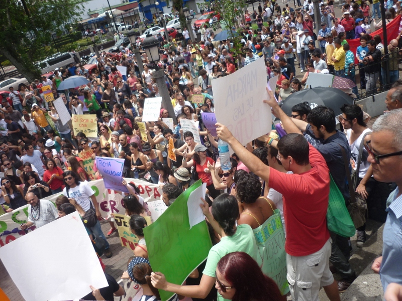 Marcha de las putas en Costa Rica, frente a la catedral metropolitana.